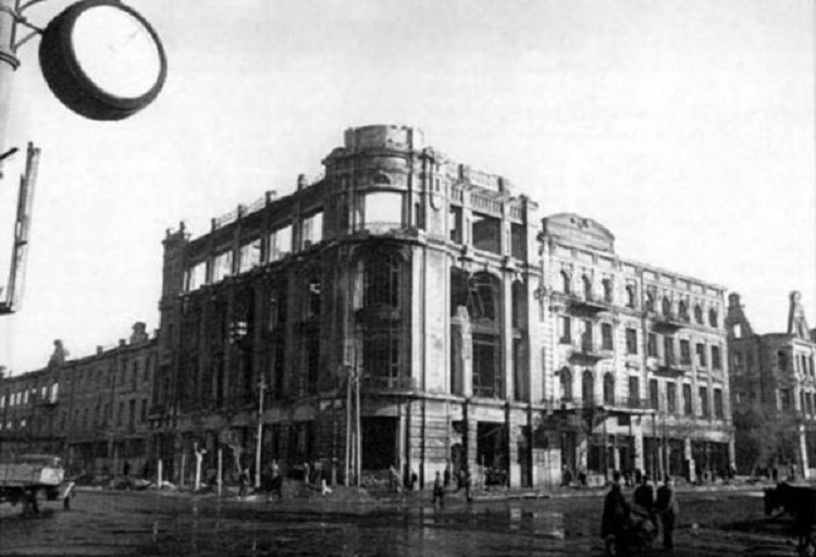 Ростов на Дону улица Садовая 1943 год